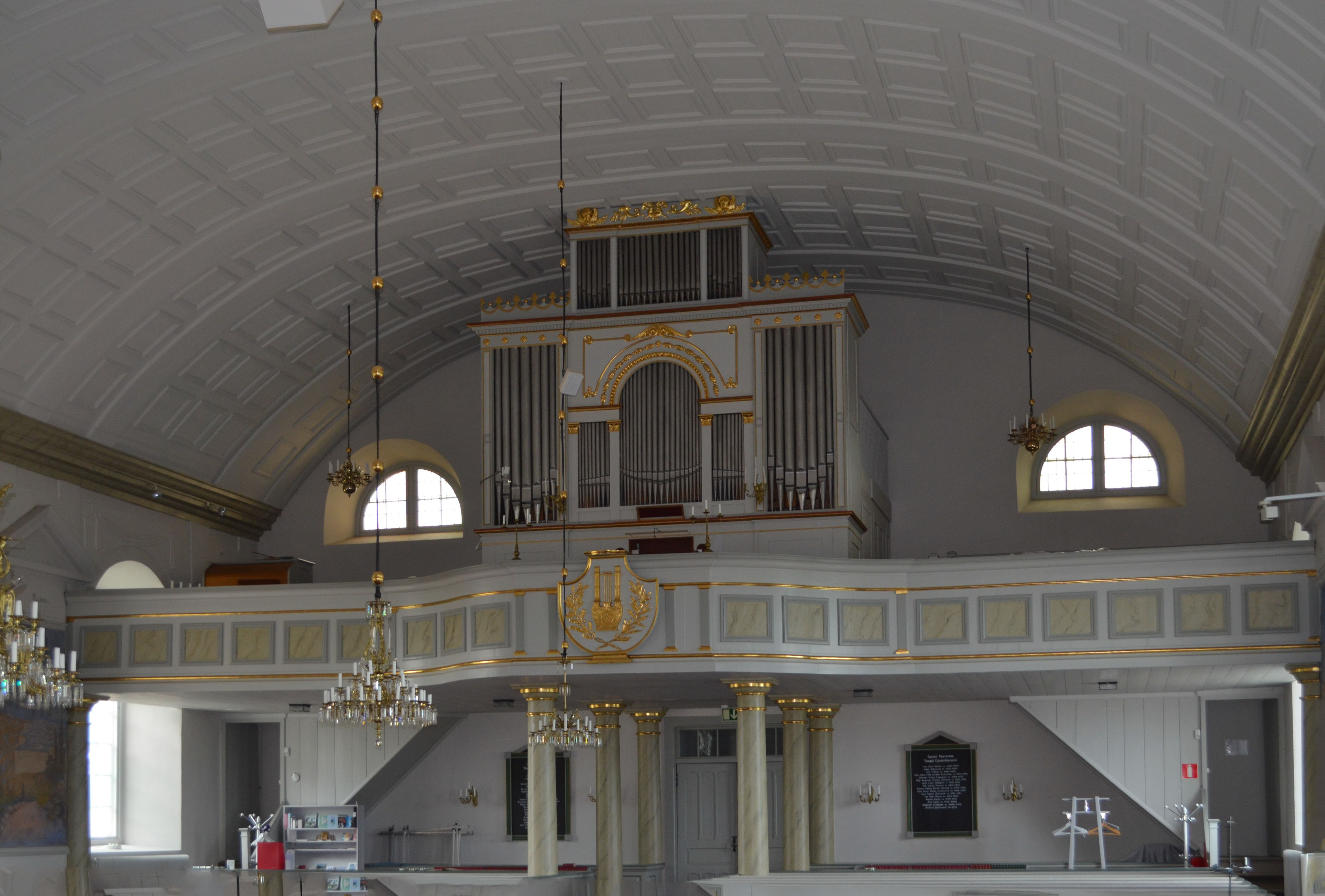 kyrkoorgeln